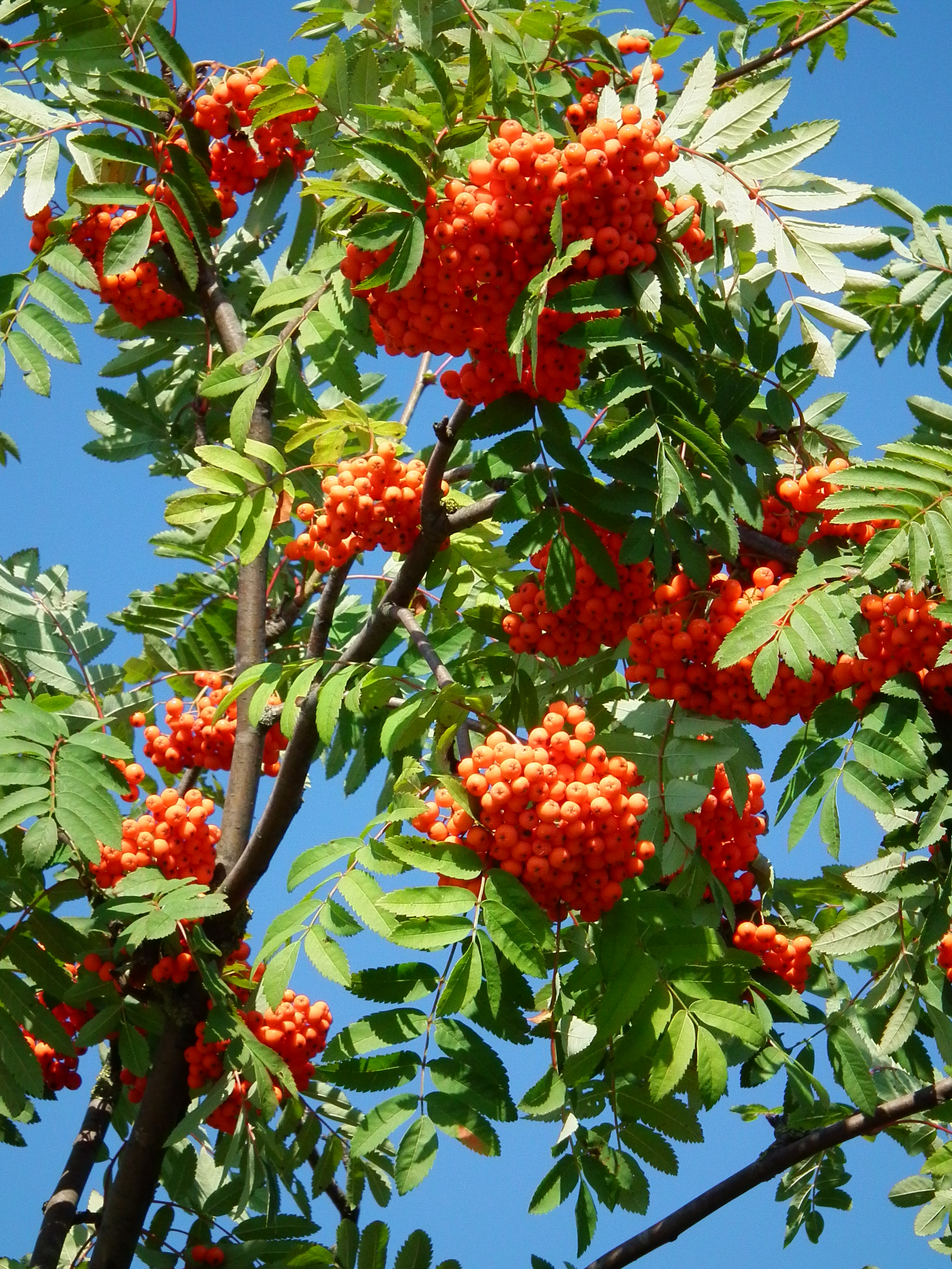 Vogelbeeren (Sorbus aucuparia), fotografiert im nördlichen Baden-Württemberg (Deutschland)